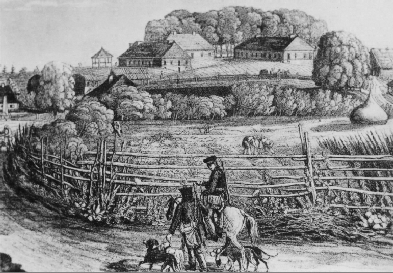 Białowieża hill